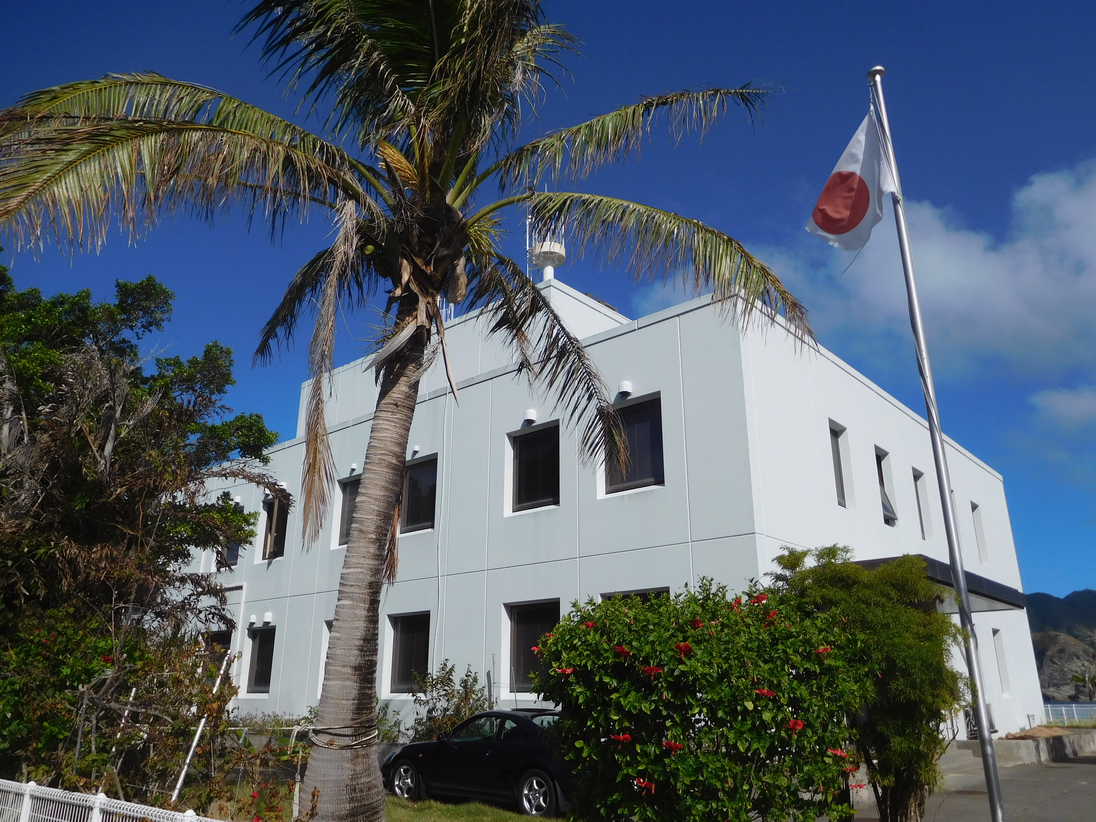 父島気象観測所